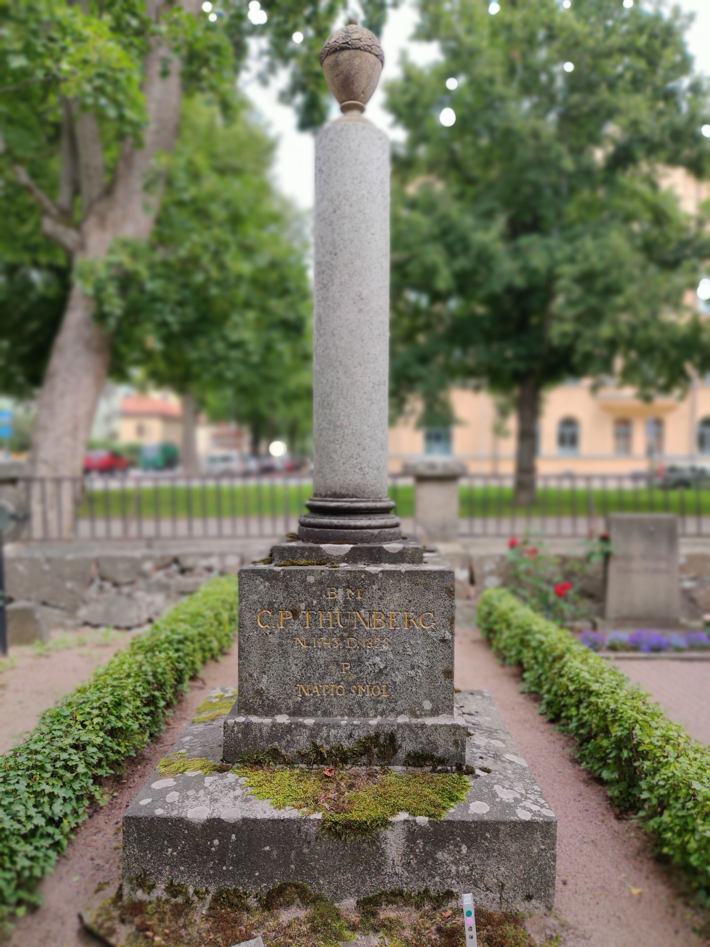 Grav på Uppsala Gamla kyrkogård